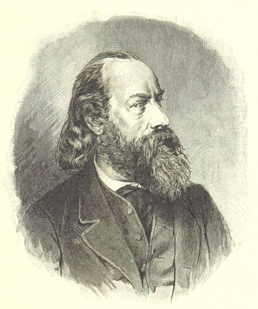 Moritz Hartmann, German poet and author. Image taken from: Title: "Az Osztrák-Magyar Monarchia irásban és képben. Rudolf trónörökös főherczeg Ő ... fensége kezdeményezéséből és közremunkálásával. (Die deutsche Ausgabe redigirt ... J. von Weilen, die ungarische M. Jókai.) Hung", "Appendix. Topography and Travels" Author: Austria Shelfmark: "British Library HMNTS 10215.k.1." Volume: 12 Page: 173 Place of Publishing: Budapest Date of Publishing: 1885 Issuance: monographic Identifier: 000149250